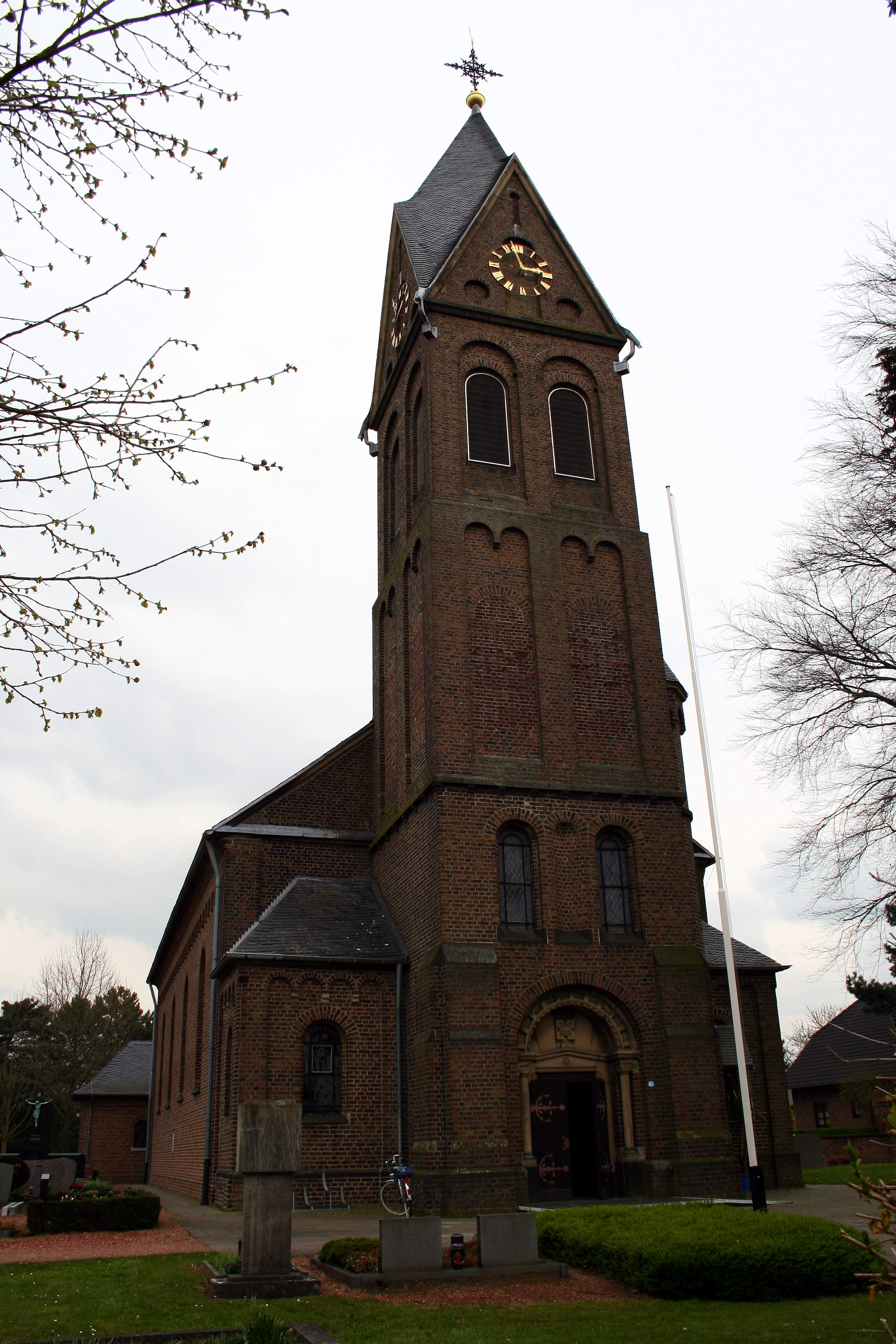 Kirche in Kirchtroisdorf